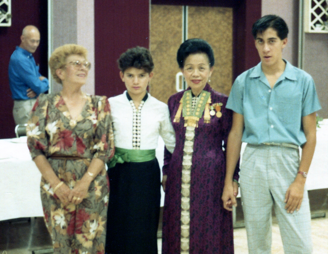 Anniversaire des 70 ans de la princesse Đèo Nàng Tỏi Seigneur du pays Taï - 1984. De Gauche à Droite : Madame Colette Minot (Famille GARAUD Belle Mère de Deo Nang Toï), S.A. Laetita Lanquë GARAUD (petite fille), S.A. Deo Nang Toï, S.A. Gwenael Louis GARAUD (Petit fils Aîné)